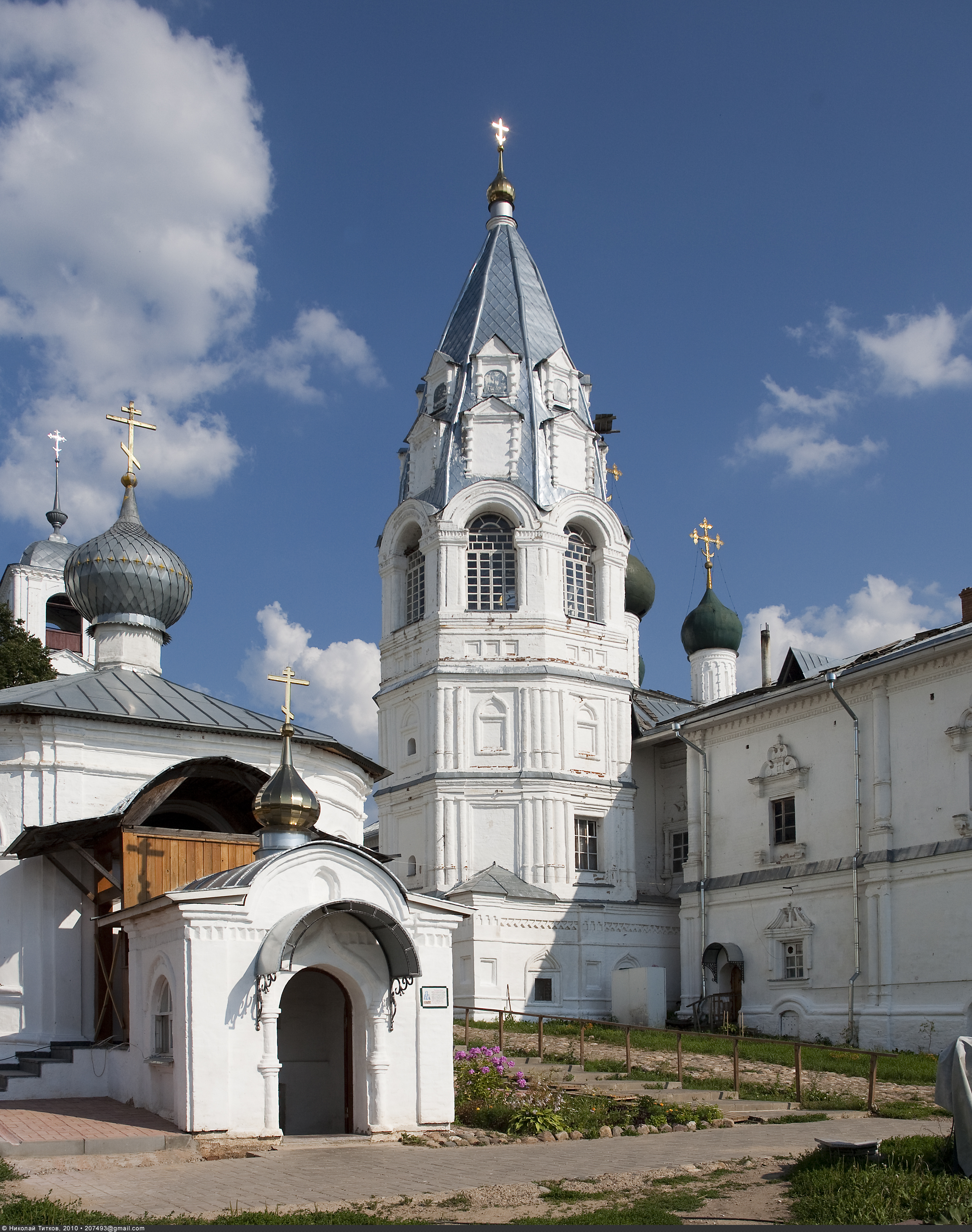 Колокольня храма Благовещения Пресвятой Богородицы (XVII век) Никитского мужского монастыря Древнейший монастырь Переславль-Залесского, по преданию основанный сыном Владимира Красное Солнышко. До Xvi веке все строения монастыря были деревянные, каменное строительство начинается лишь при Василии Iii. Монастырь был разорён в 1611 году при наступлении на город польско-литовских войск. В советское время монастырь был закрыт и возвращён епархии в 1993 году.